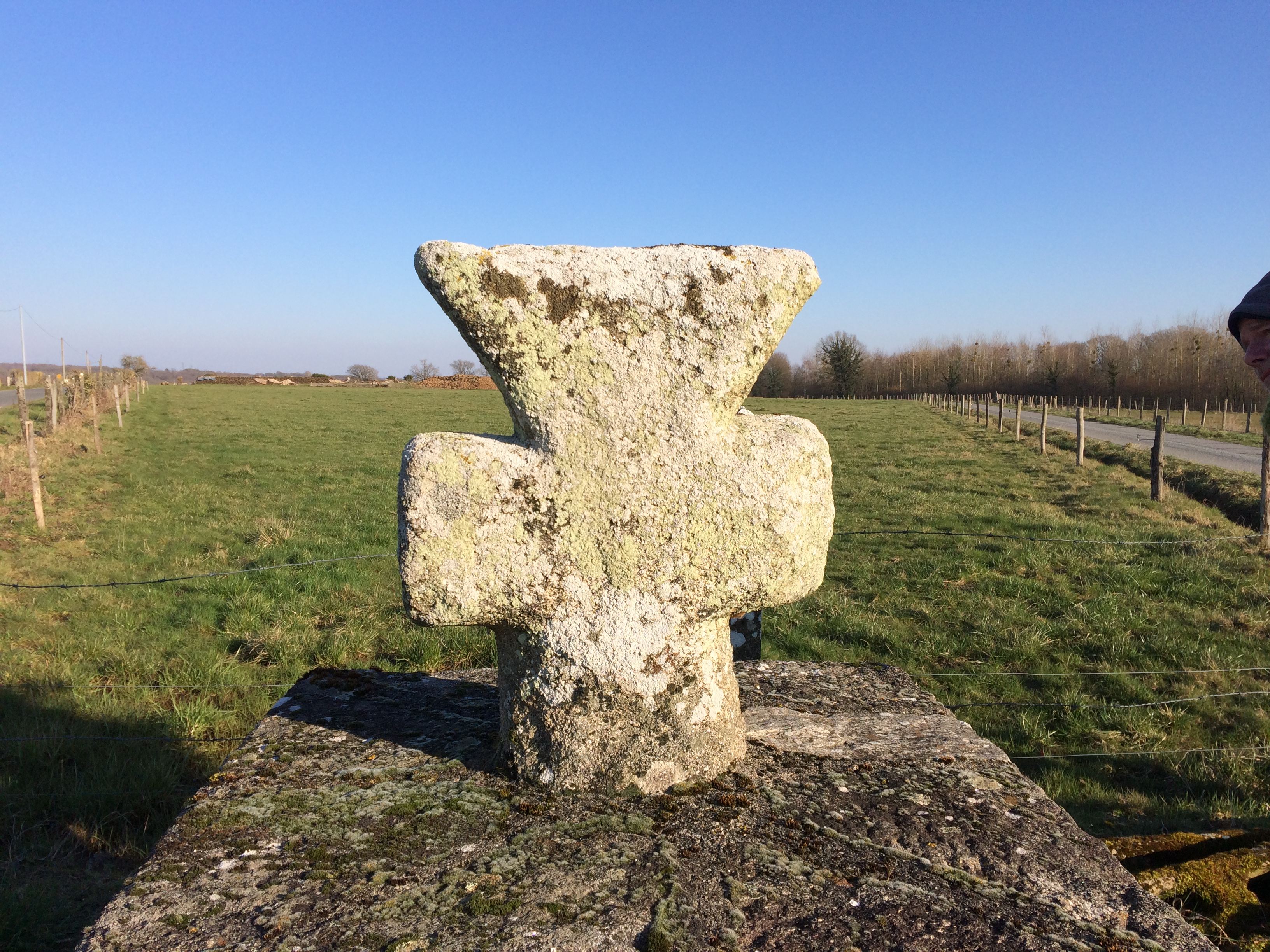 Croix pattée "type Crozant" au village de la Journalière sur la commune de Crozant, Creuse. Croix du haut Moyen Age.